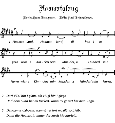 Hoamatgsang (Landeshymne Oberösterreich)